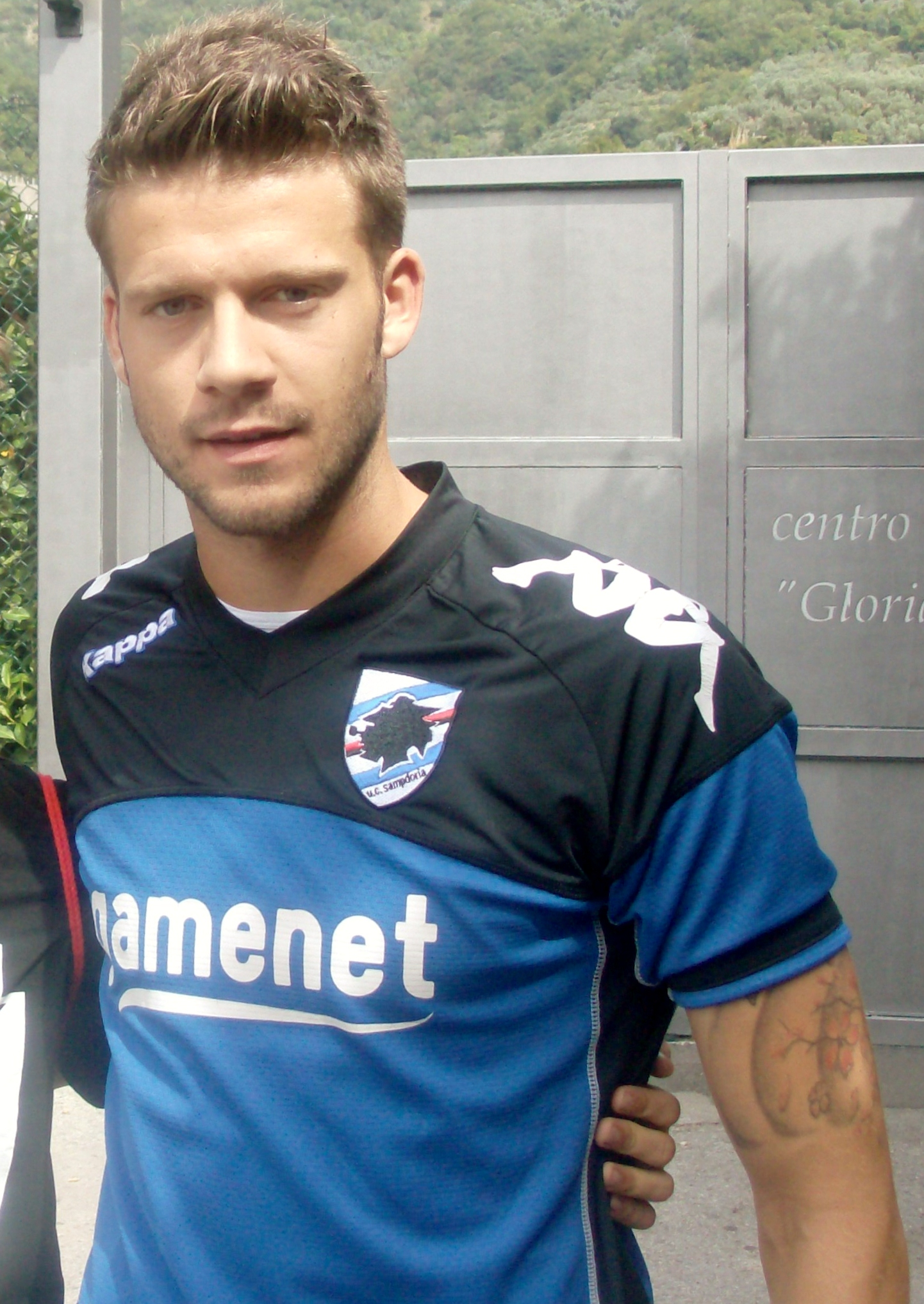 Costa con la maglia da allenamento della Sampdoria